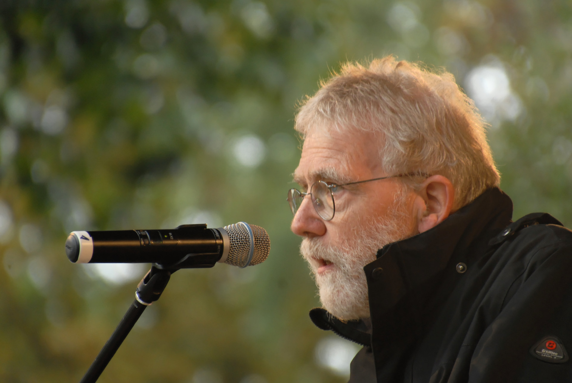 Jost Baum beim Engelsfest 2015 in Wuppertal, Germany